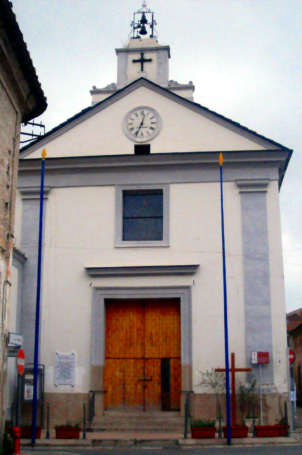 Chiesa di Sant'Andrea Apostolo, a Sant'Andrea dei Lagni, rione di Santa Maria Capua Vetere